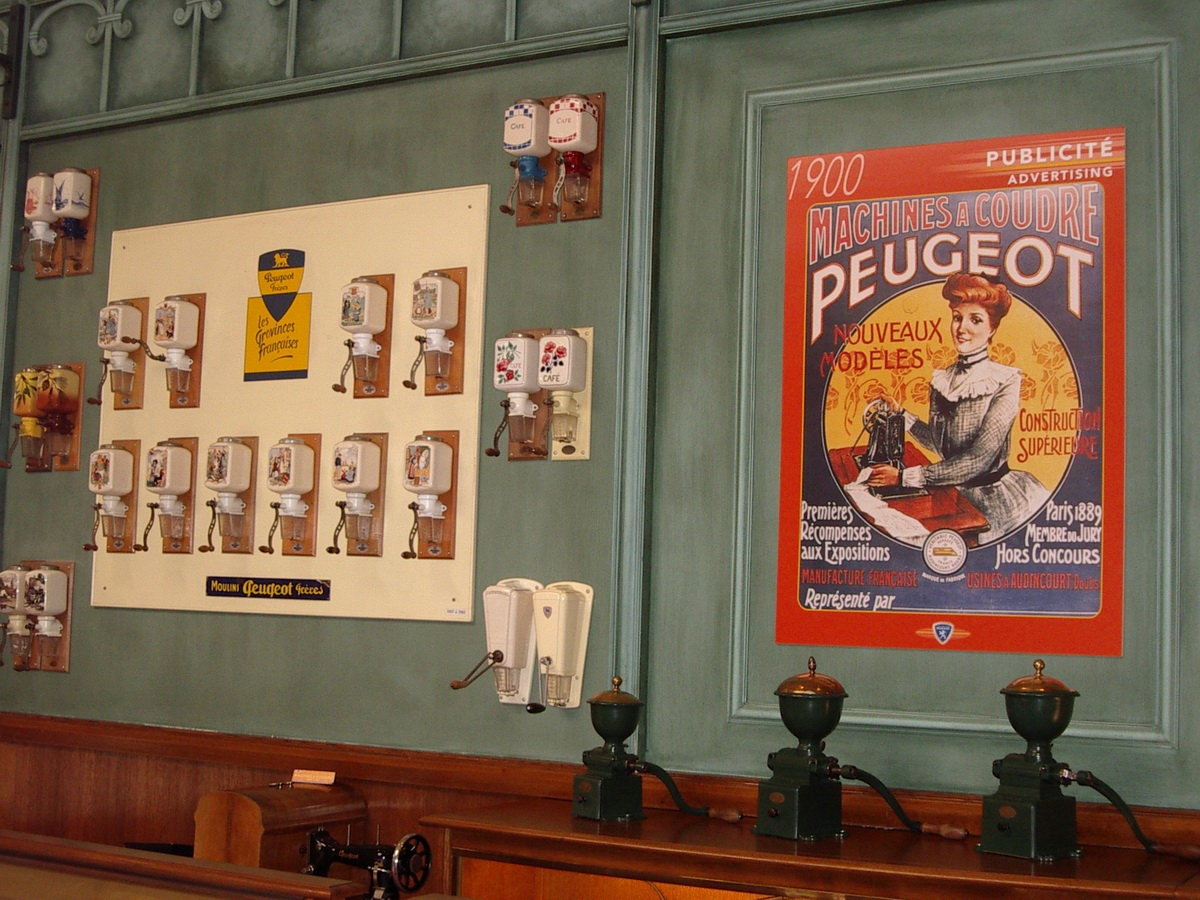 Moulins à Café Peugeot - Musée Peugeot Sochaux de: Kaffeemühlen, Werbeplakat für Nähmaschine – Peugeot Museum Sochaux